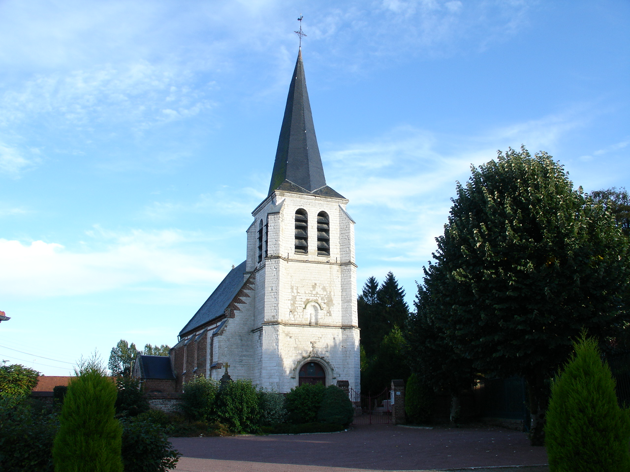 Église de Le Quesnoy-en-Artois